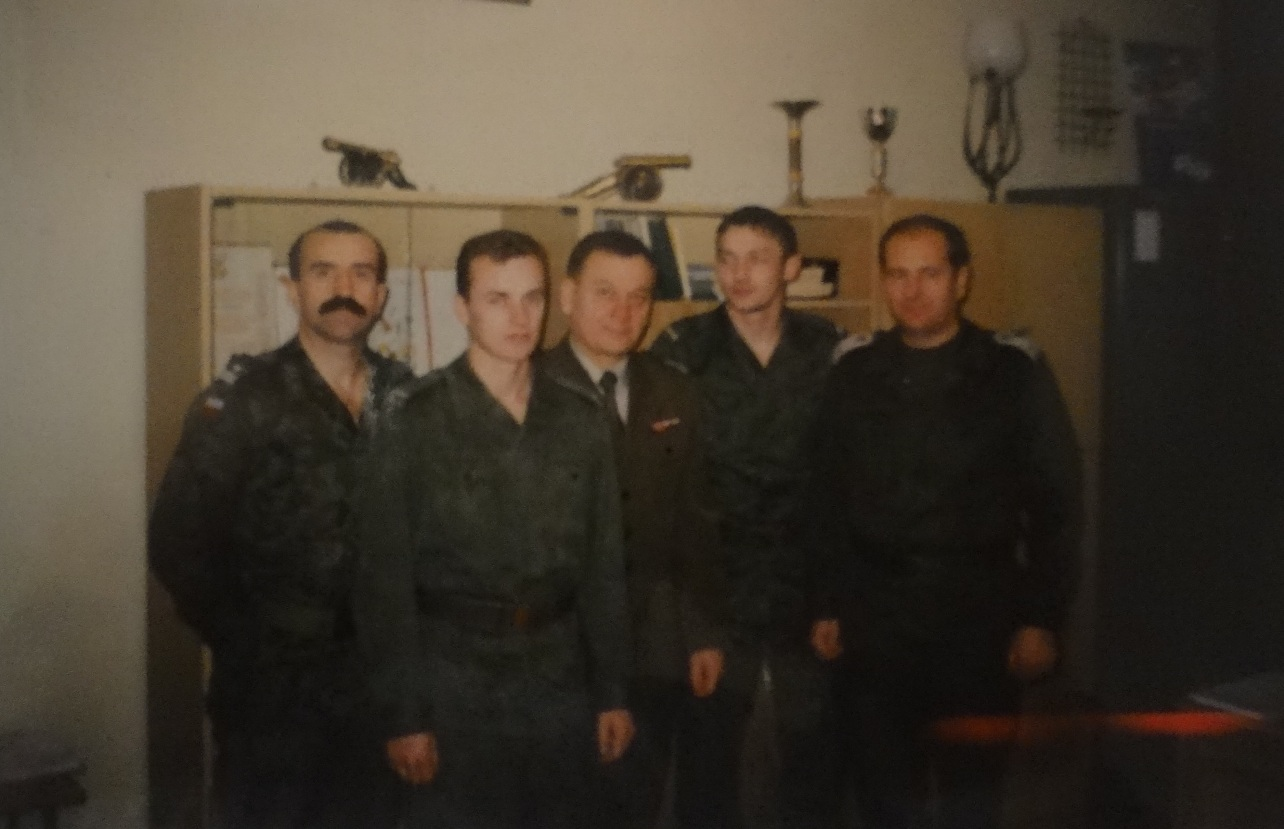 Dowództwo 45 Batalionu Medycznego podczas spotkania z żołnierzami odchodzącymi do rezerwy